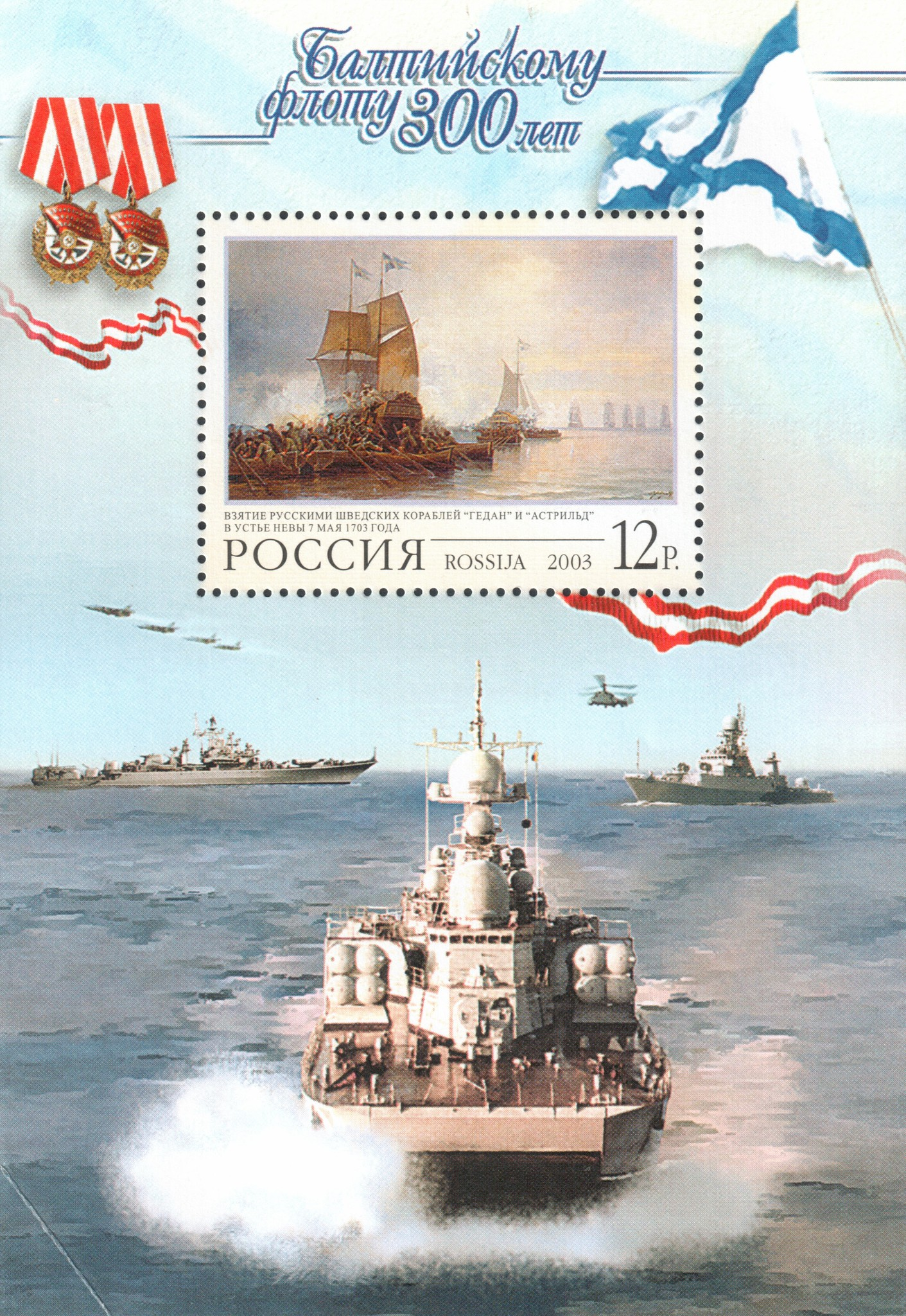 Почтовая марка России